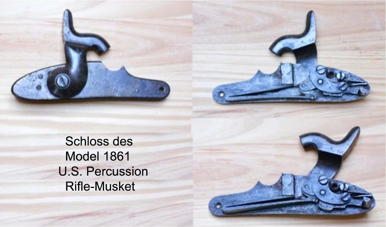 Schloss Model 1861USRifle